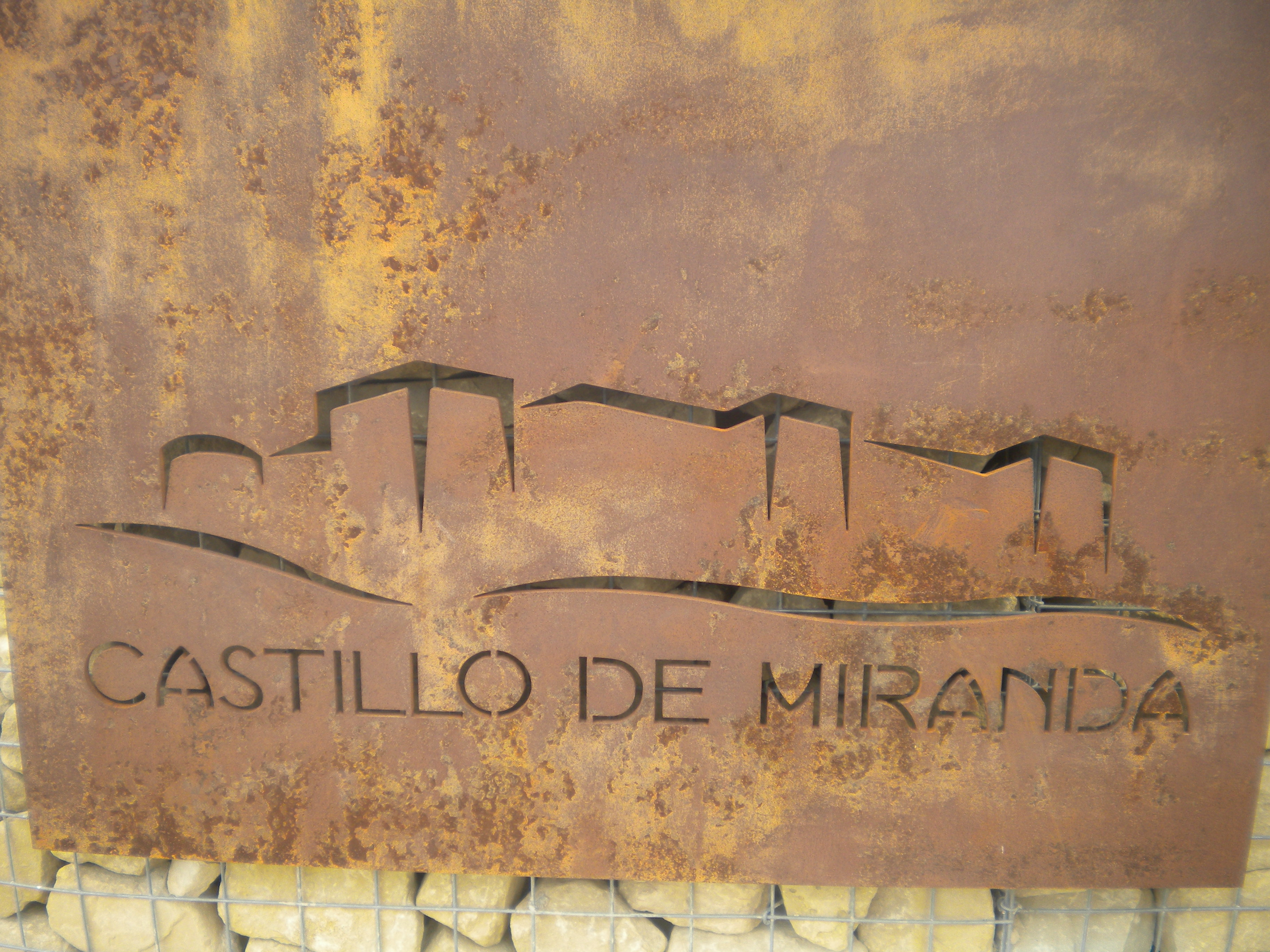 Logotipo del Castillo de Miranda de Ebro (Castilla y León, España)